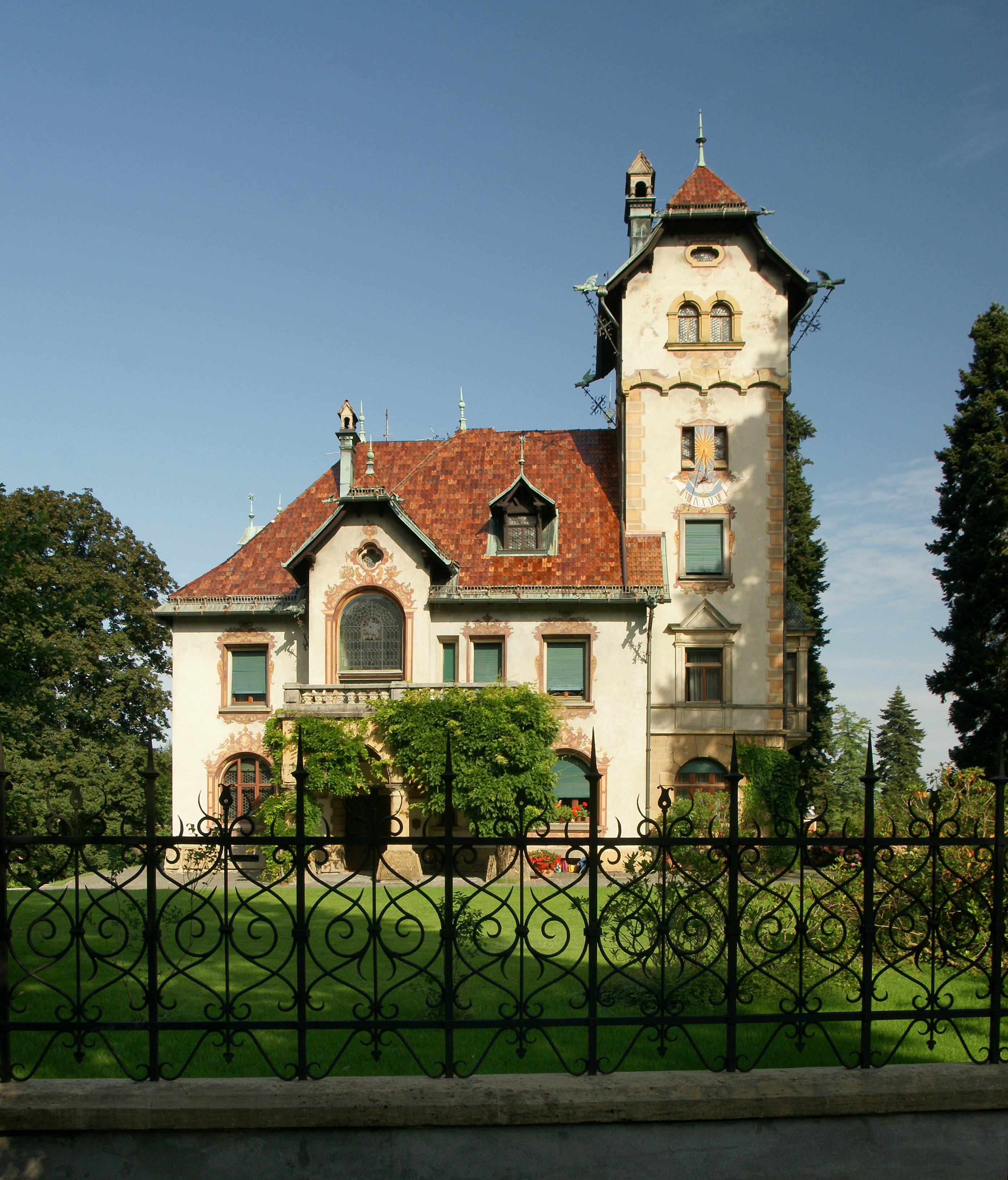 aus dem DEHIO Vorarlberg 1983: Dr.-Waibel-Strasse Nr.14: Villa, erbaut 1890/92 von Architekt Julius Rhomberg und dem Baumeister J.A.Albrich. Mehrgliedriger Bau mit Schopfwalmdach, angehängten Bauteilen; Erker mit Zwiebelhelm, Terasse, bergfriedartiger Turm mit Krüppelwalmdach (oberster Teil vorkragend auf Arkaden); Lüftlmalerei; Park mit originaler Einfriedung (Toreinfahrt in Art eines Treppengiebels (originaler Zaun, bezeichnet 1892). In Dornbirn, Oberdorf. Dr. Renate Madritsch, Landeskonservatoriat für Vorarlberg Dornbirn, Dr. Waibelstraße 14; Die zu den Fabriken gehörigen Fabrikantenvillen in der Dr.-Waibel-Straße in Dornbirn bestechen durch ihre eklektische für die Bauzeit typische Gestaltung und ihre Lage inmitten großzügig angelegter Parks mit exotischem Baumbestand. Die Villa Guntram Hämmerle (1862-1923), jüngster Sohn des Firmengründers F.M. Hämmerle wurde 1890 bis 92 von den Architekten Julius Rhomberg und J.A. Albrich im feudalen sogenannten altdeutschen Stil mit zahlreichen Zitaten aus der deutschen Renaissance, erbaut. Zu den Textilwerken Hämmerle gehörten die Weberei Dornbirn Weppach, die Färberei in Dornbirn Steinebach und die Spinnerei Gütle. Später kamen die Spinnerei Feldkirch Gisingen, die Webereien Dornbirn Sägen und Eulental hinzu (heute Eleonore Rhomberg). Diese Villa wird noch von den Nachfahren des Firmengründers bewohnt.